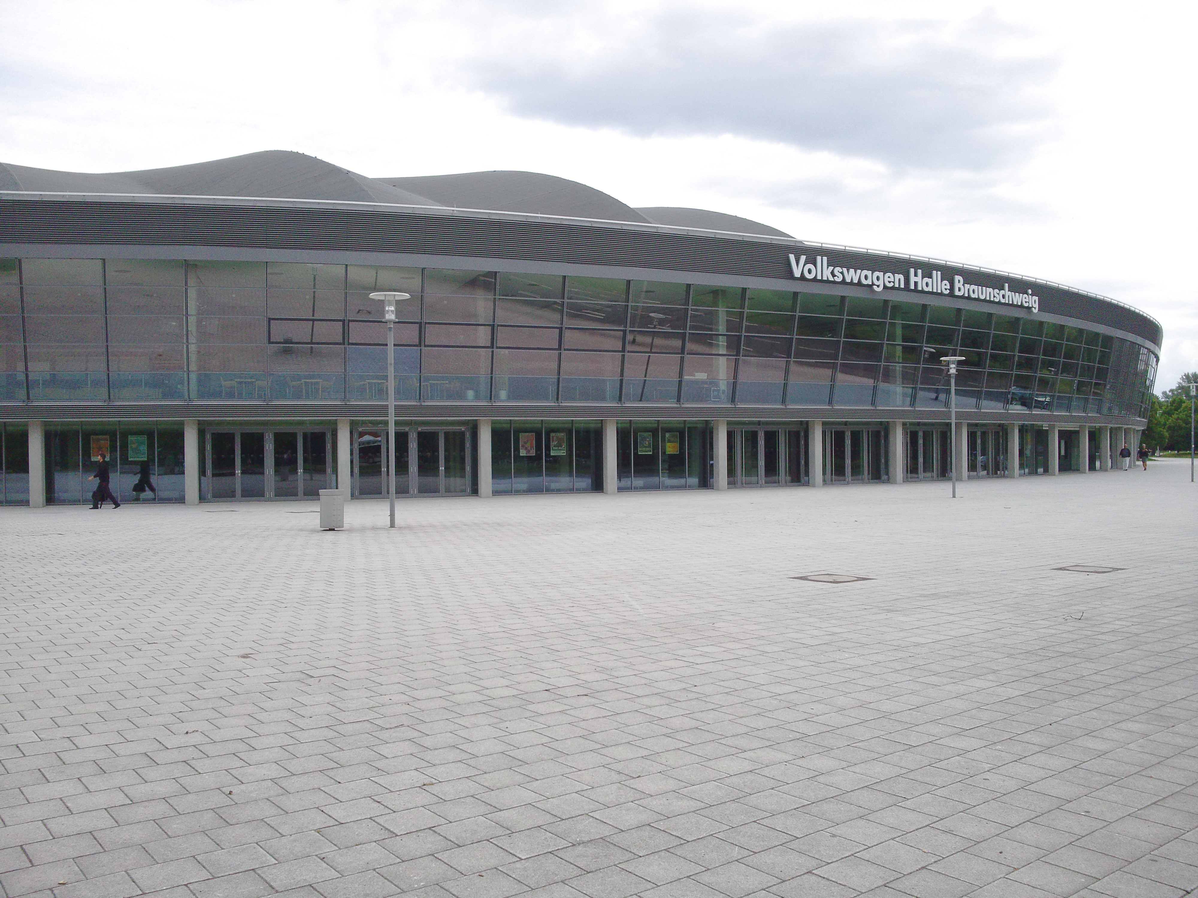 Die Volkswagen Halle in Braunschweig